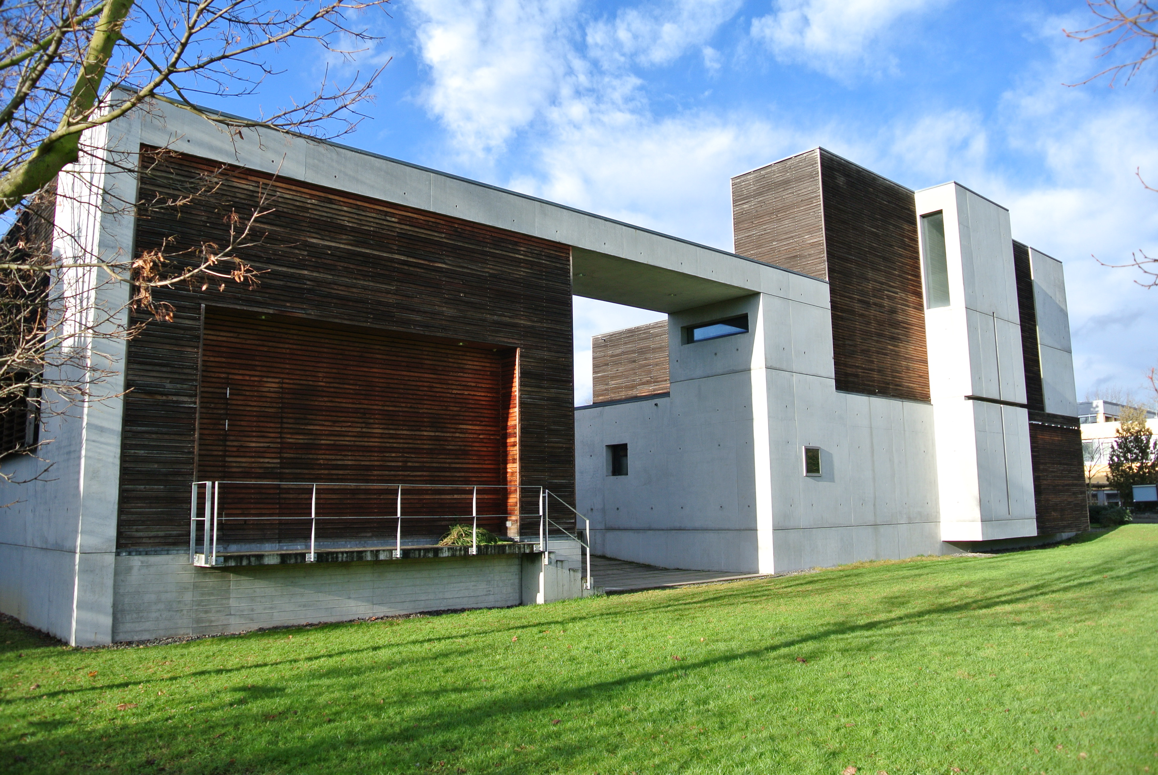 Kirche Jesus Christus, der gute Hirte in Frankfurt am Main, Nieder-Erlebach, Bauzeit: 1996-2000, Architekt: Günter Pfeifer, Außenansicht